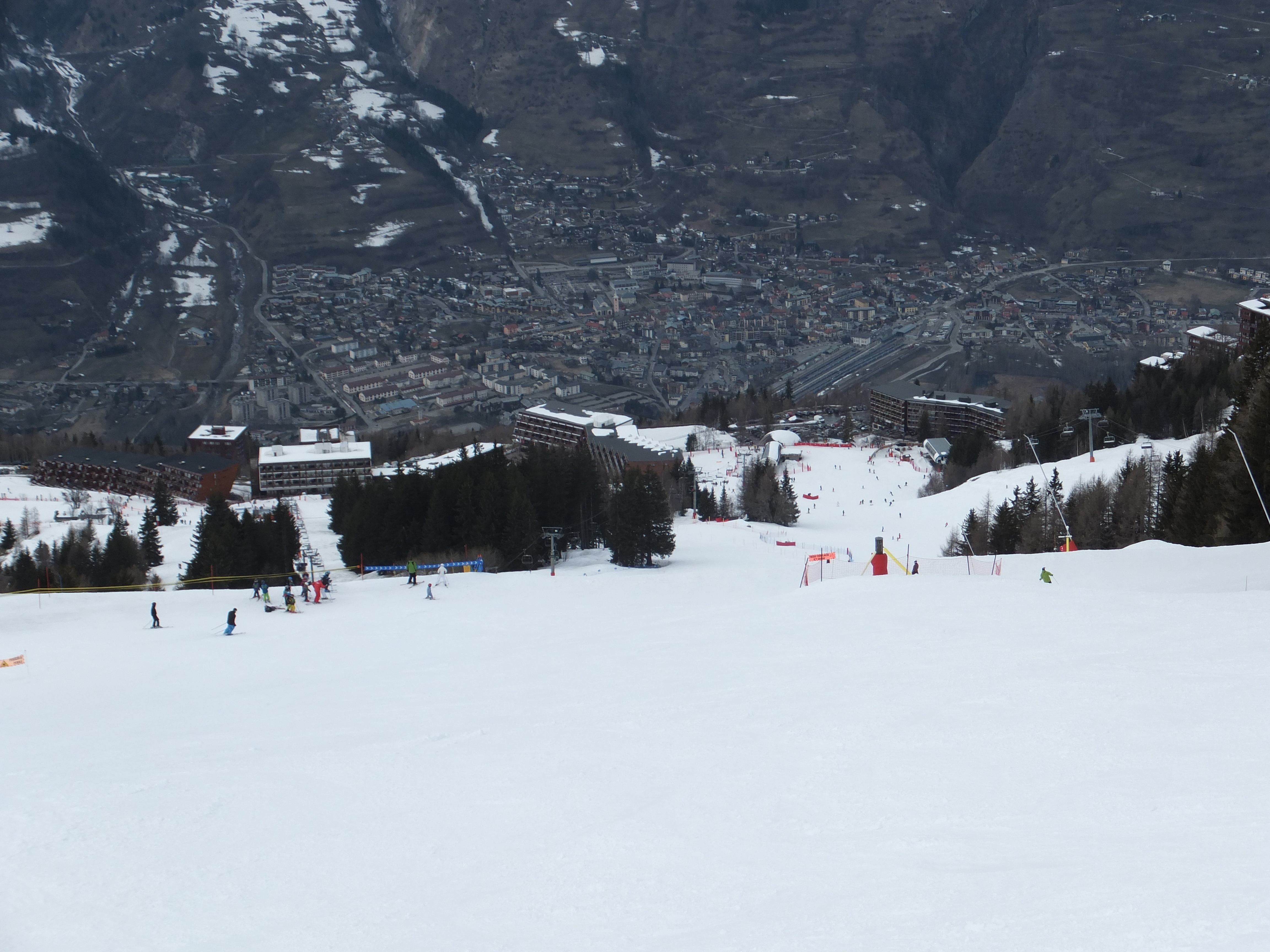 Arc 1600 depuis la piste rouge Cachette